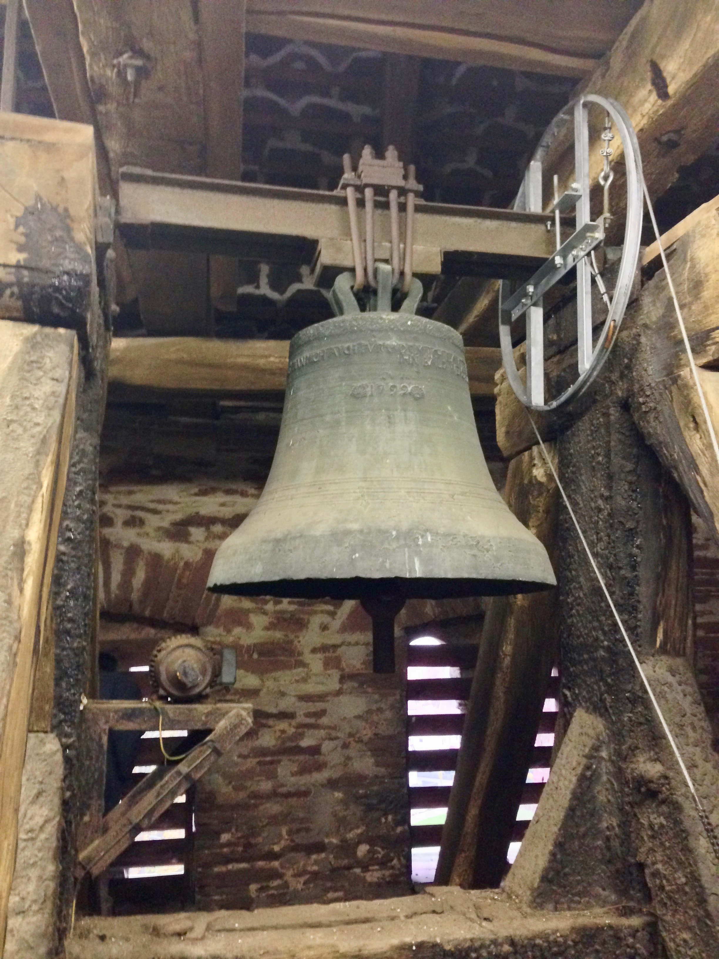 Bild der Glocke von St. Kilian